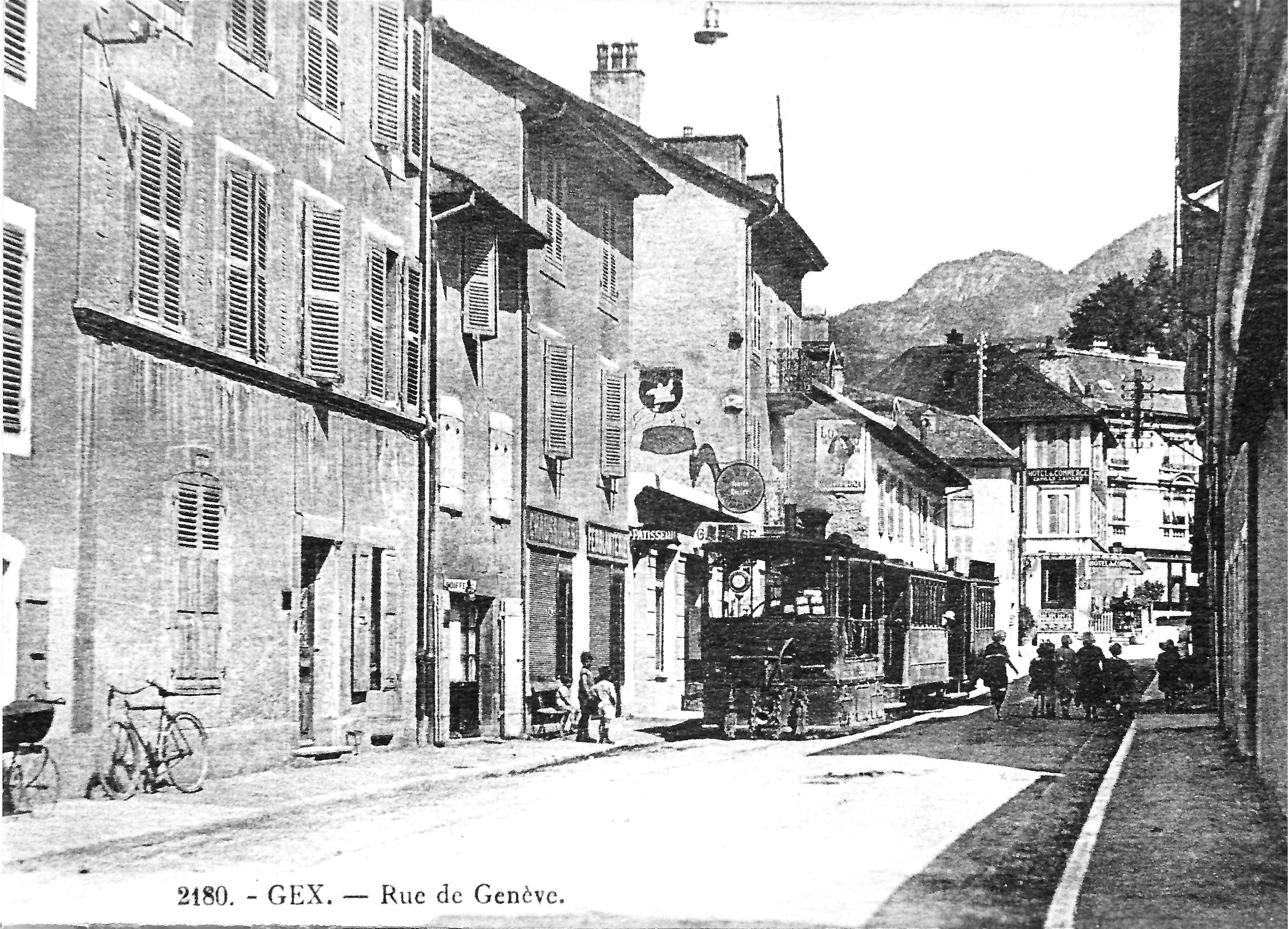 Tram van de Compagnie du tramway de Gex à Ferney-Voltaire in Gex